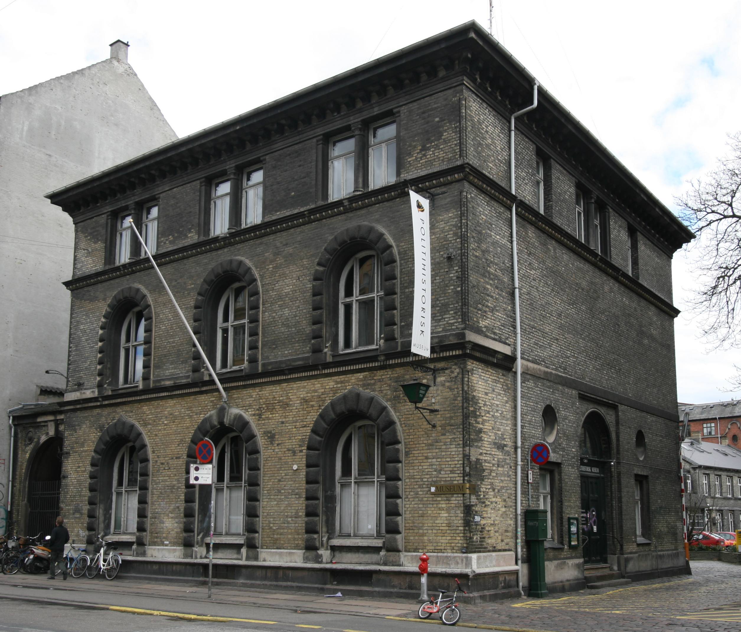 Police Museum.